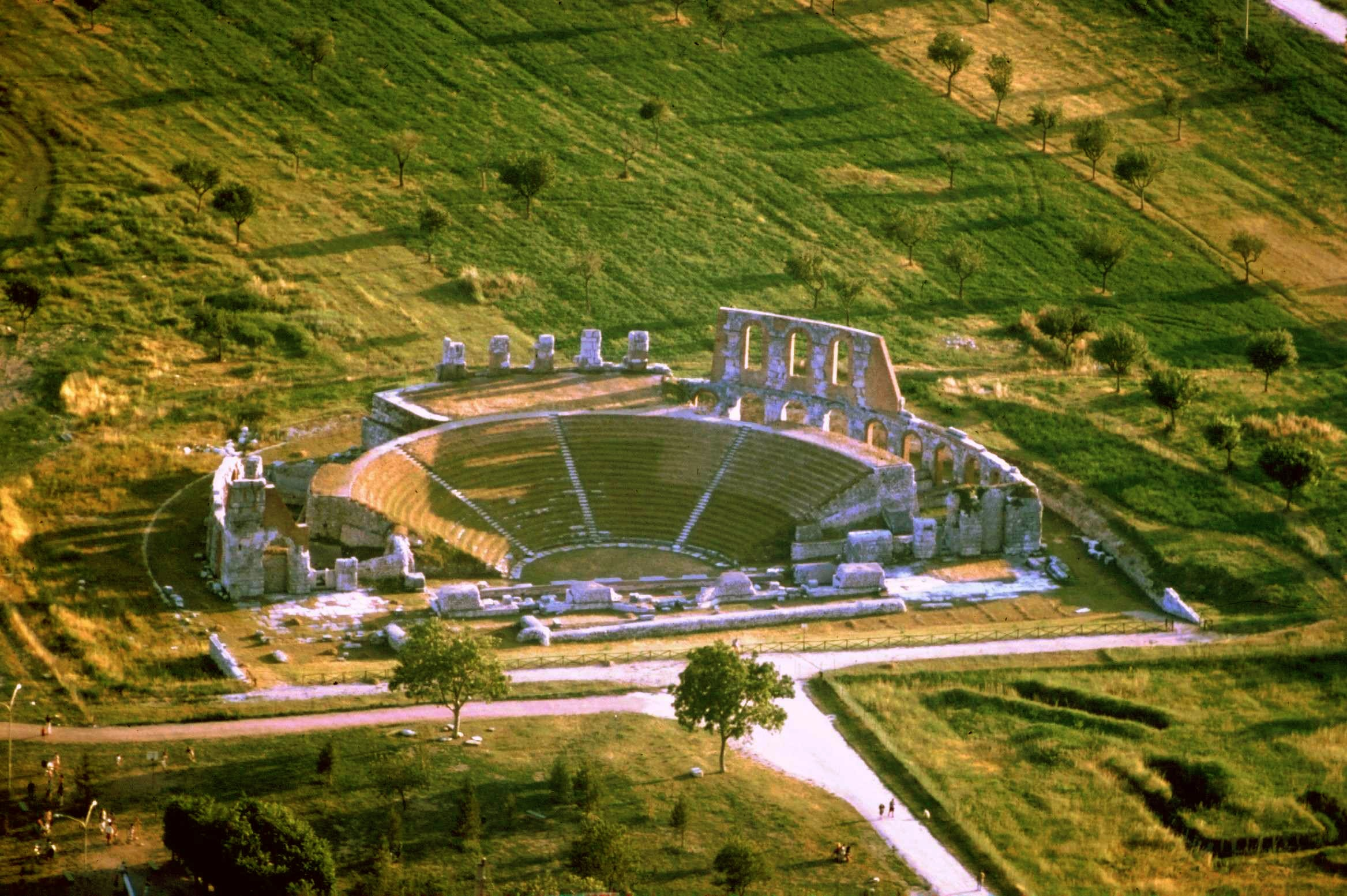 Celso Mosca, Gubbio, anfiteatro romano